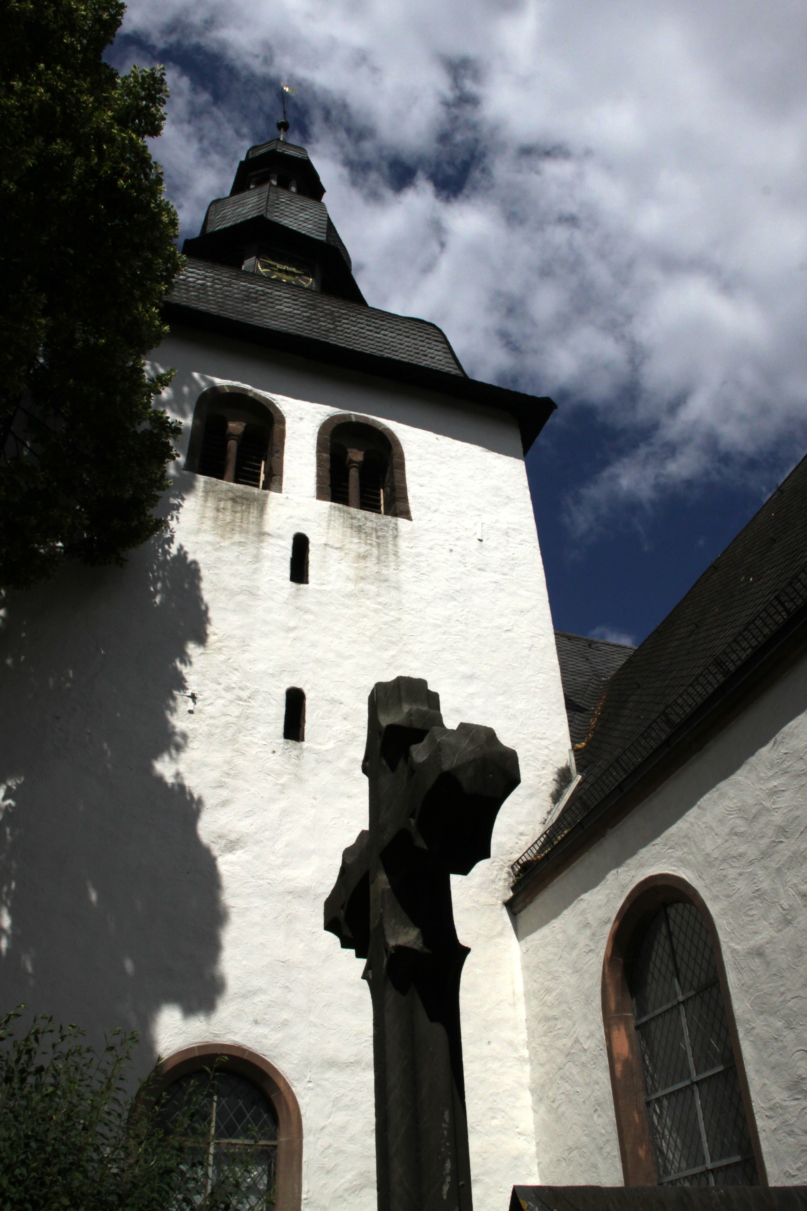 Kirchturm der evangelisch reformierten Kirche in Lemgo-Brake, im Vordergrund ein altes Grabkreuz